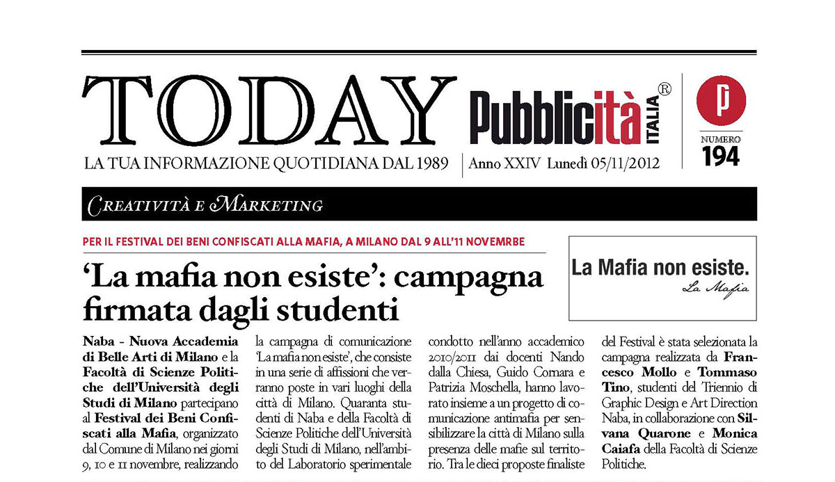 Recensione dell'edizione 2012 del Festival dei beni confiscati alle Mafie